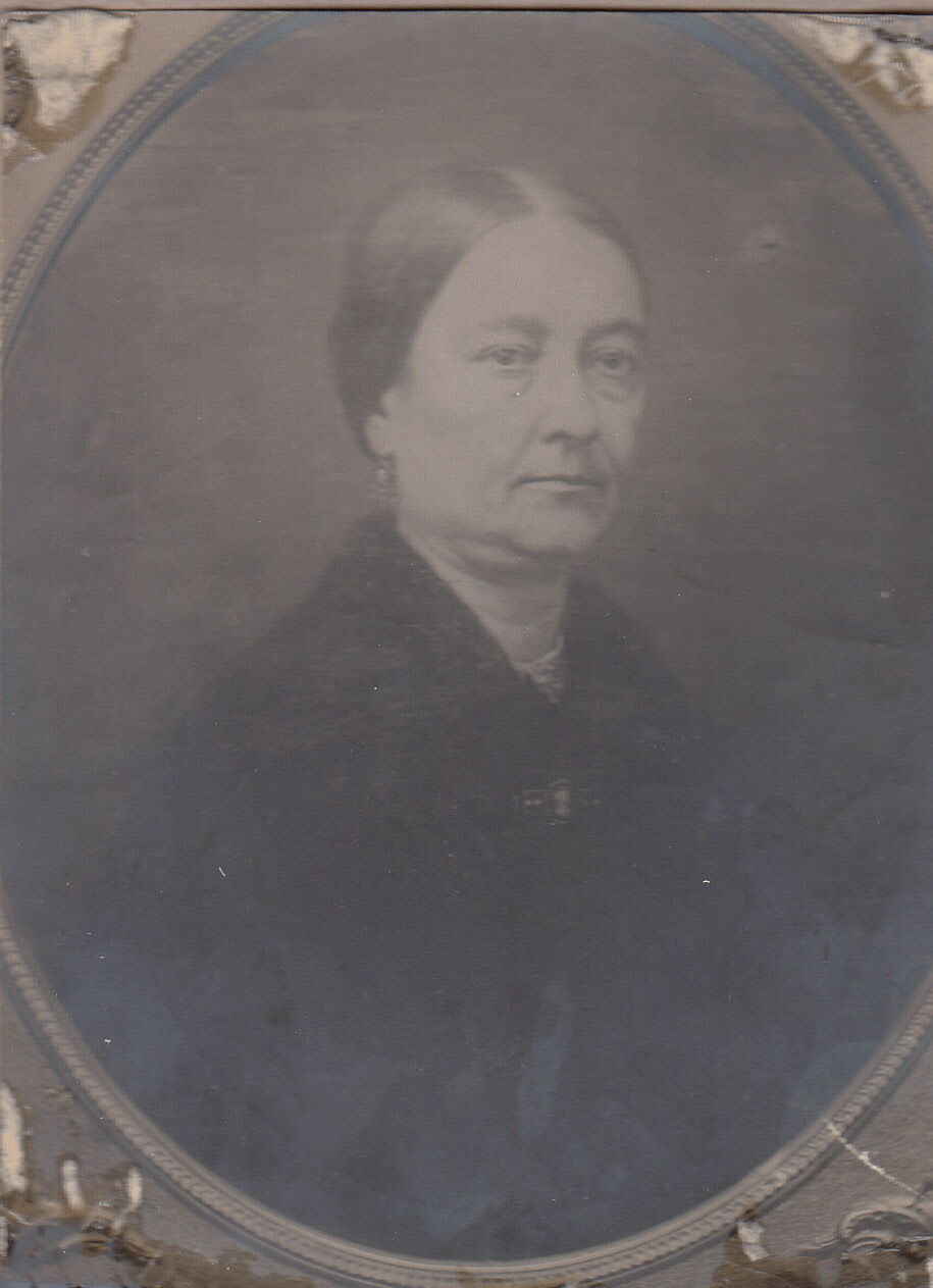 Fotografía de 1880 en Santiago de Chile. Es la esposa de Diego Vergara Albano